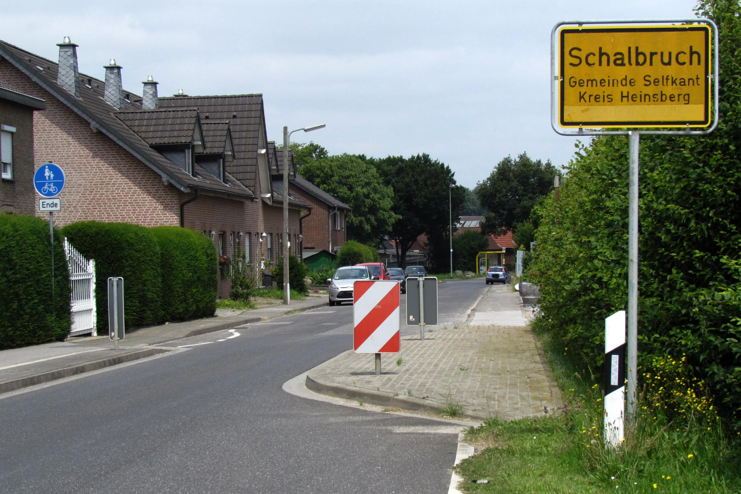 Schalbruch Ortseingang